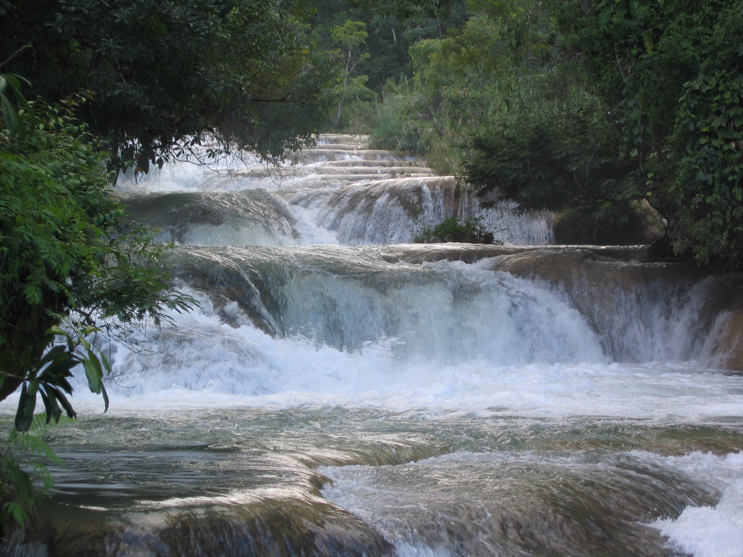 Cataratas de Agua Azul Own work Jan 2007